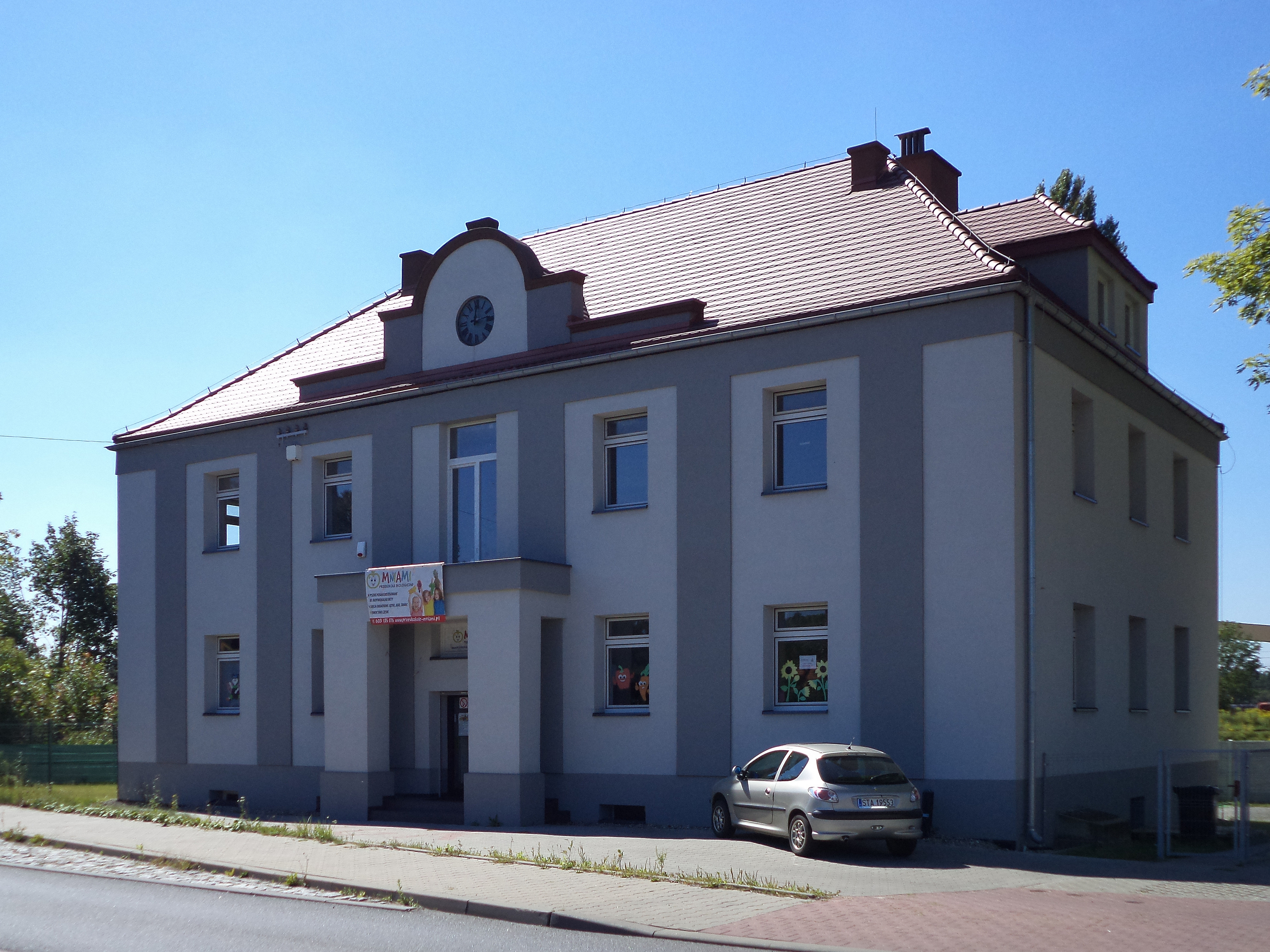 Budynek dawnego Urzędu Miejskiego w Strzybnicy